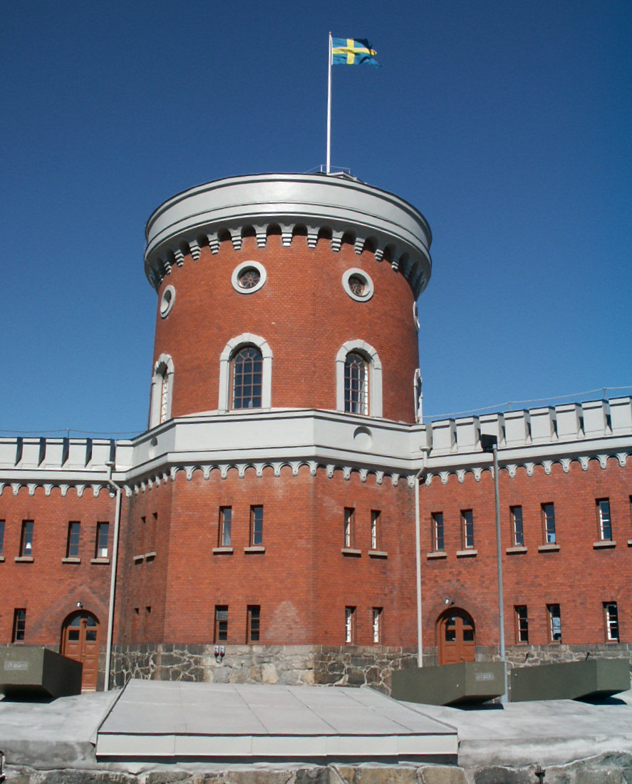 Kastellet, Stockholm, Sweden.